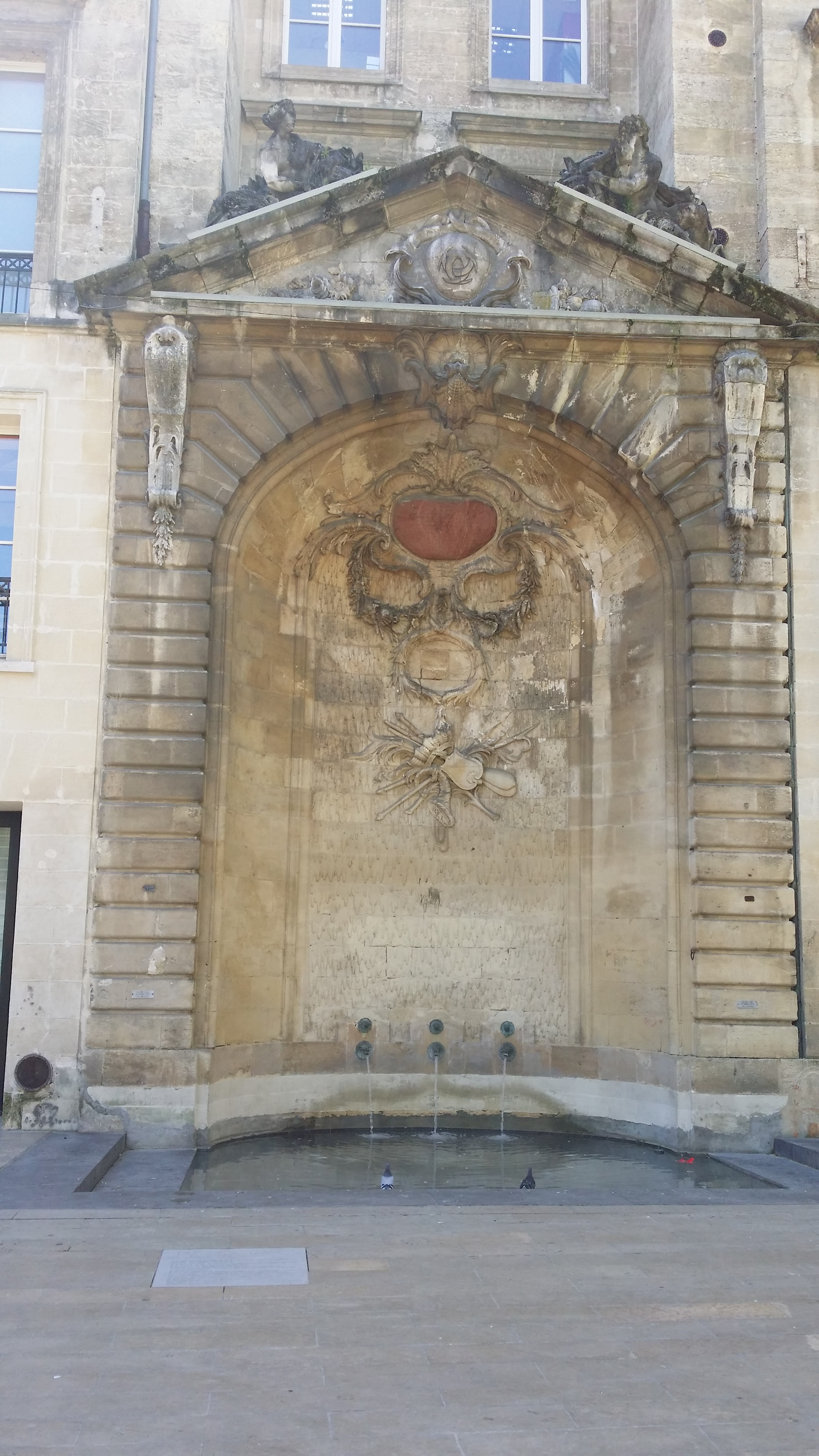 Saint-Projet plazako iturria